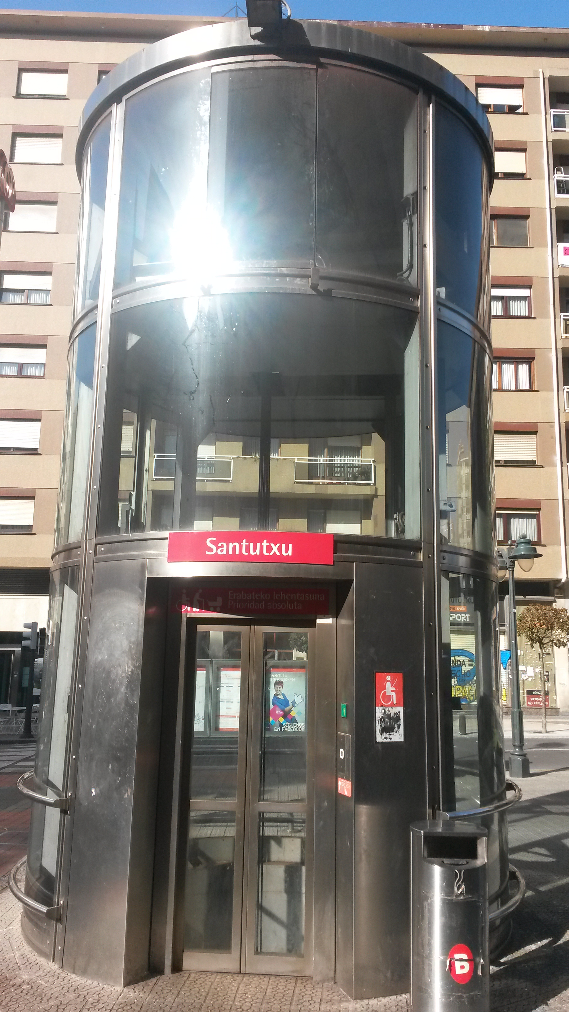 Acceso a la estación de Santutxu de Metro Bilbao por el Karmelo. Imagen del ascensor.